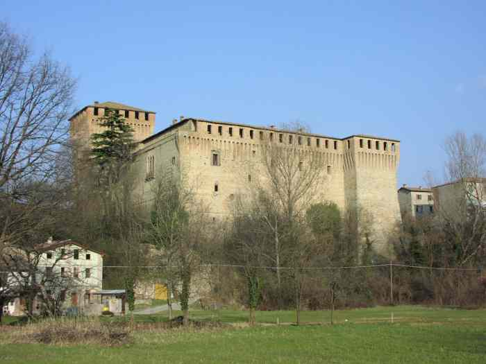 Foto del Castello di Varano de' Melegari dal torrente Ceno.